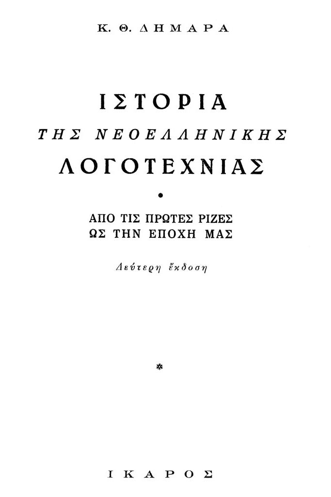 Εξώφυλλο της δεύτερης εκδοσης της Ιστορίας της Νεοελληνικής Λογοτεχνίας του Κ.Θ.Δημαρά